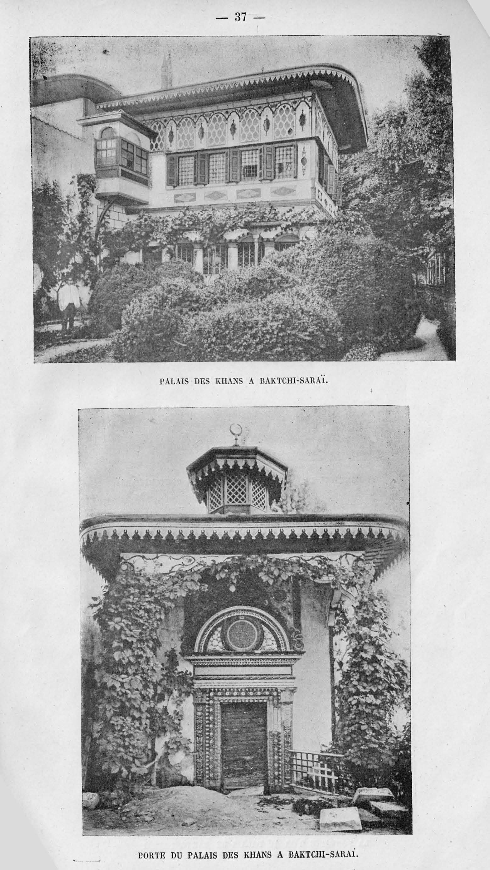 En Crimee / par le baron de Baye. - Librairie Nilsson, 1906. - 55 с.